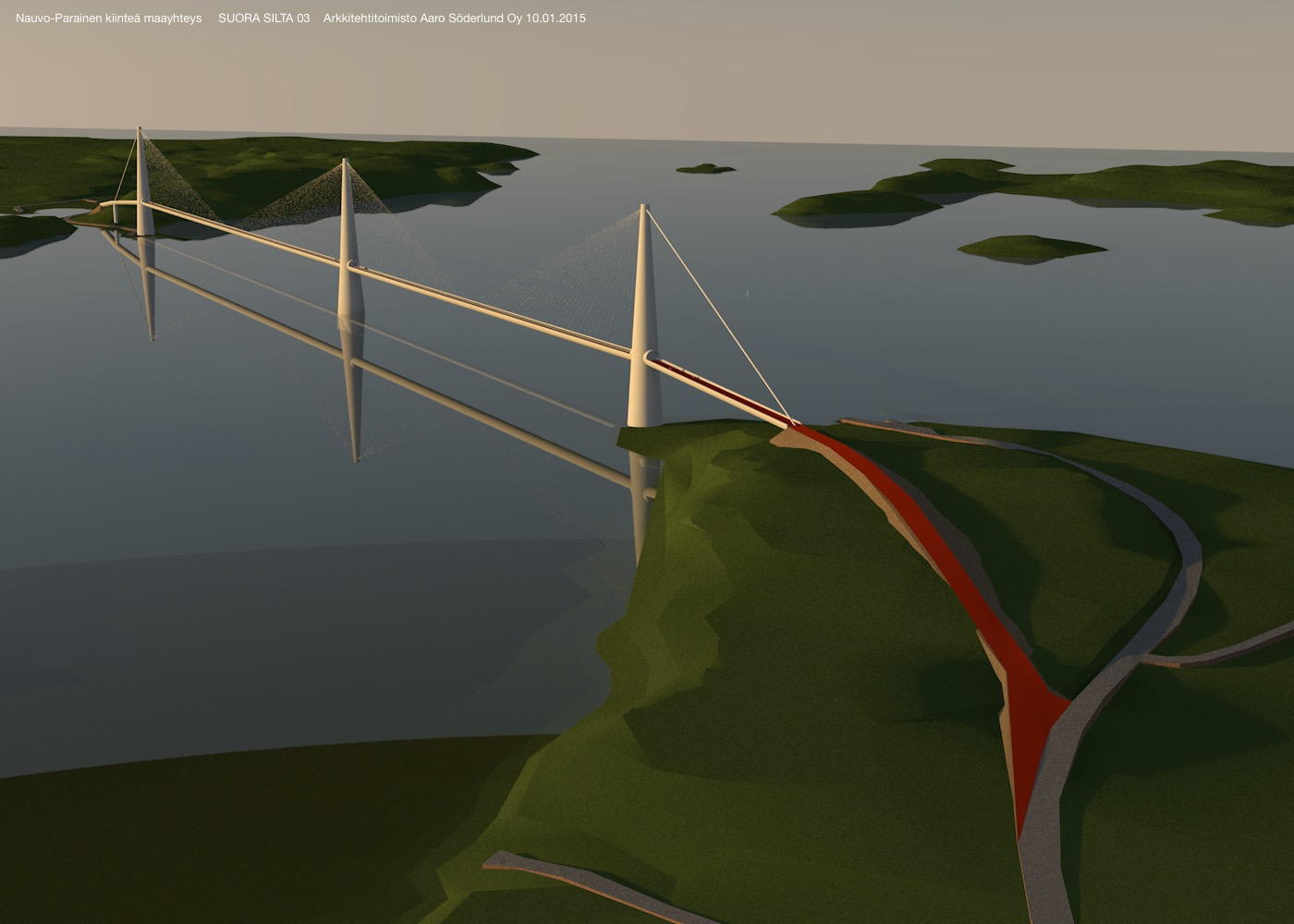 Kolmipyloninen epäsymmetrinen vinoköysisilta (pituus 1600 m) nykyiselle Nauvo-Parainen maantielauttavälille sijoitettuna (konsepti); havainnekuva ilmasta, Lillmälön puolelta